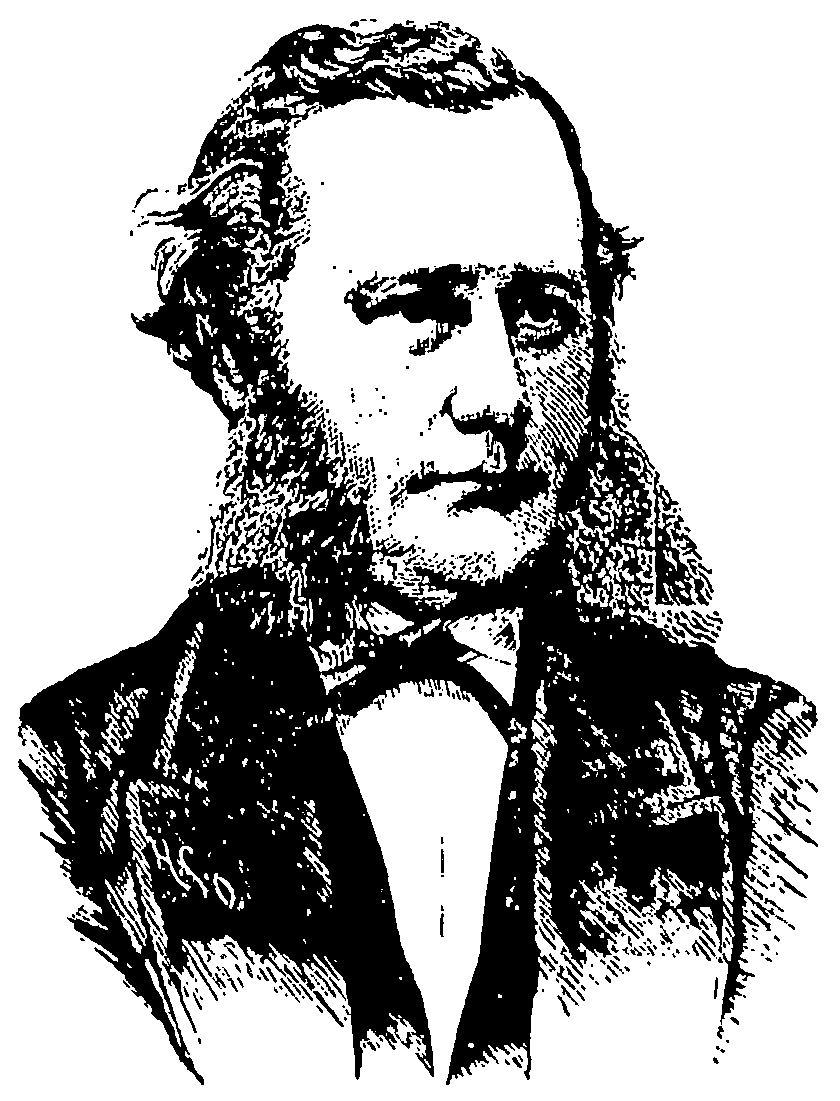 Den norske advokaten Jacob Thurmann Ihlen.